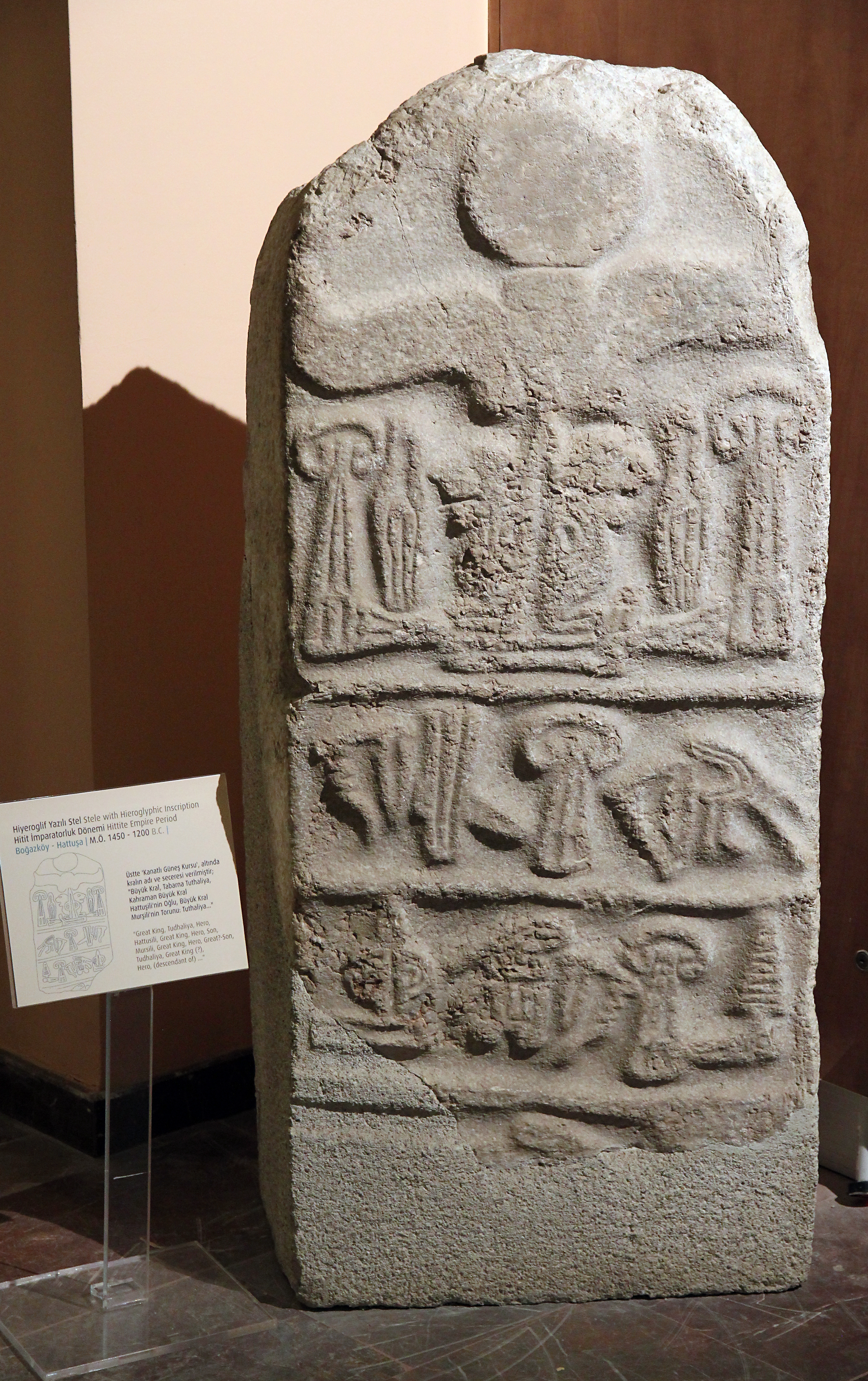 Archäologisches Museum Çorum, Zentraltürkei, Stele mit Hieroglyphen-Inschrift aus Hattuša